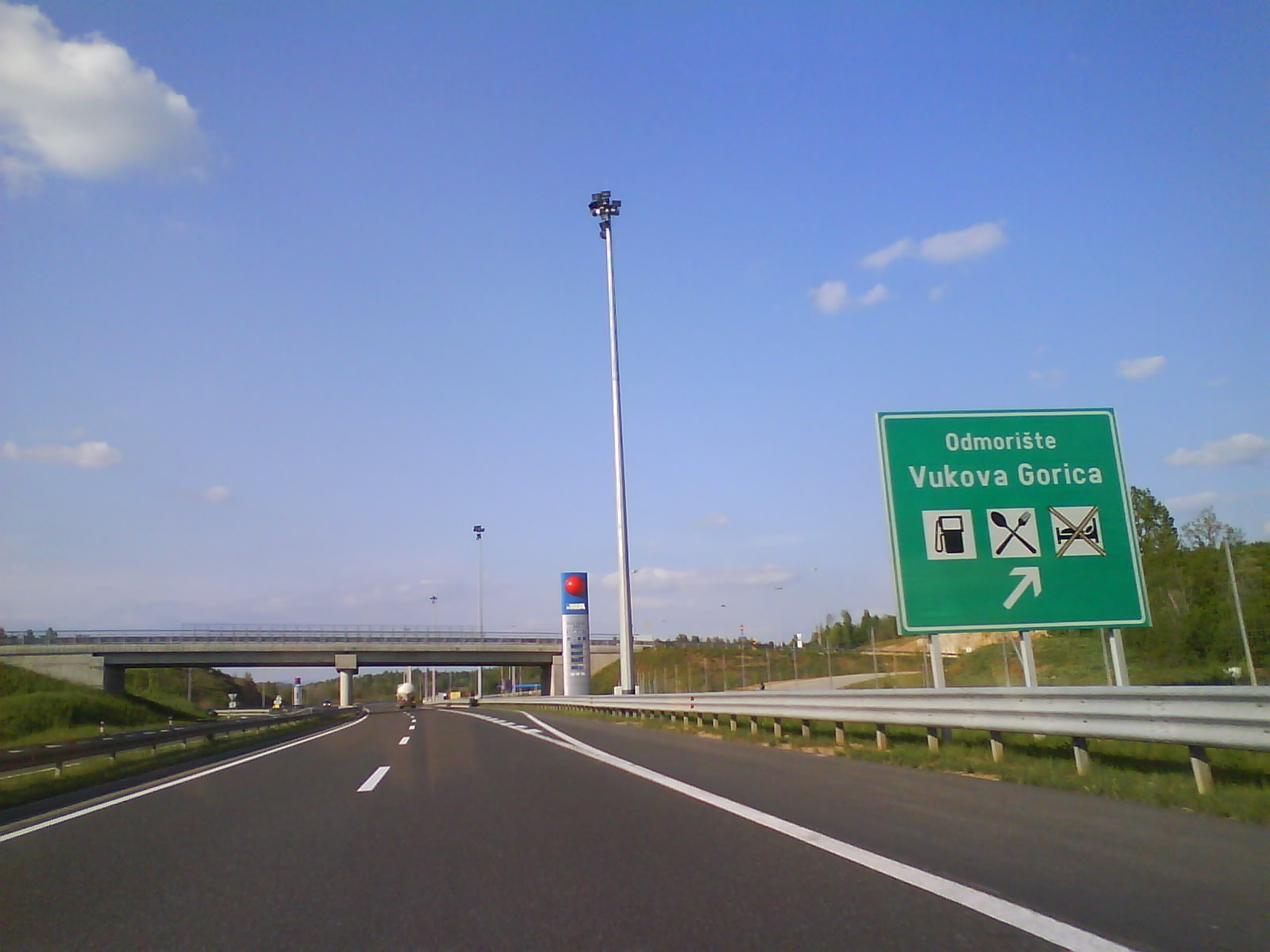 Odmorište Vukova Gorica